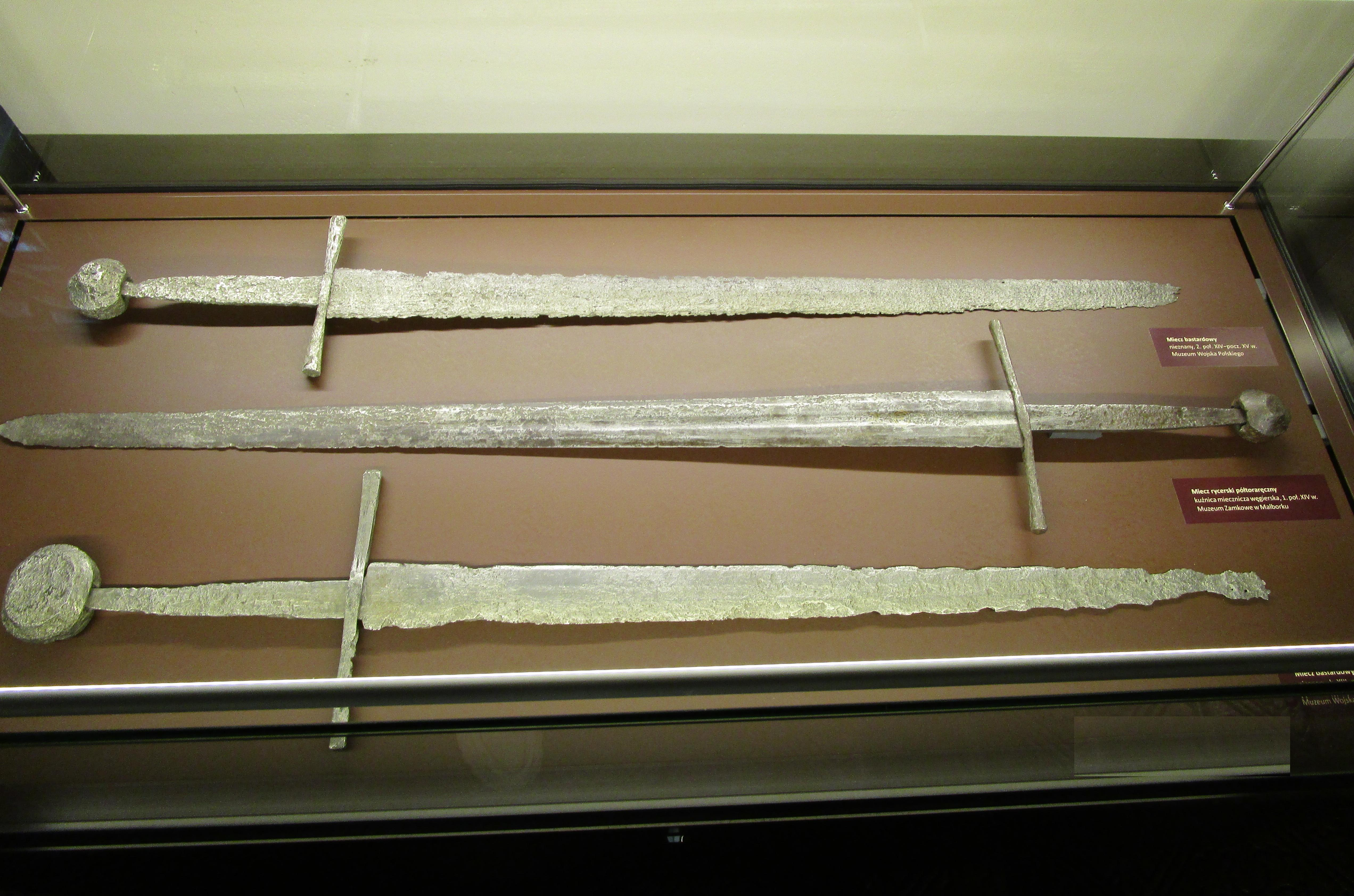 Beispiel von Funden im historischen Museum